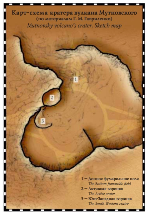 По материалам вулканолога Г. М. Гавриленко